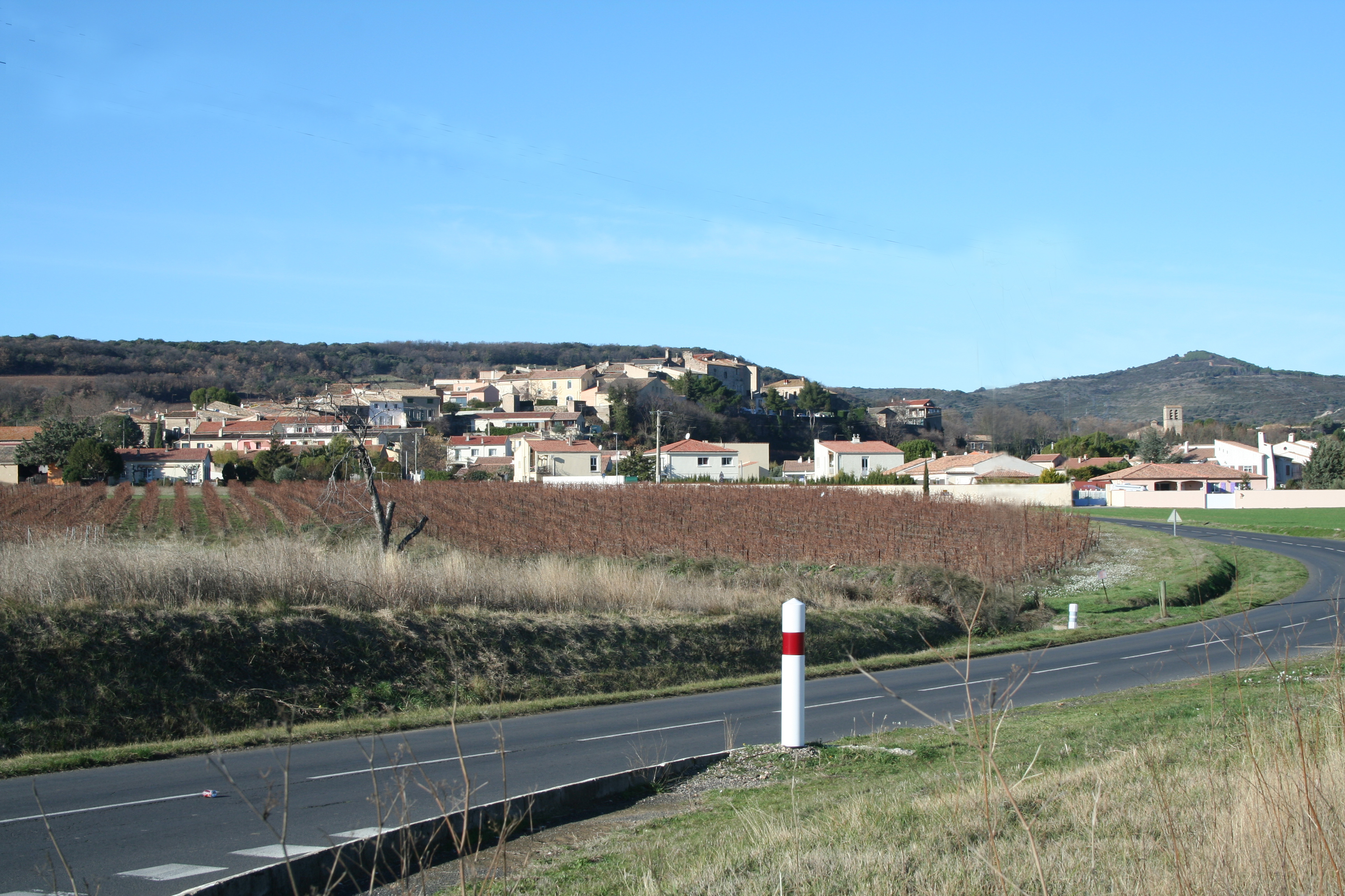 Fontès (Hérault) - vue générale.